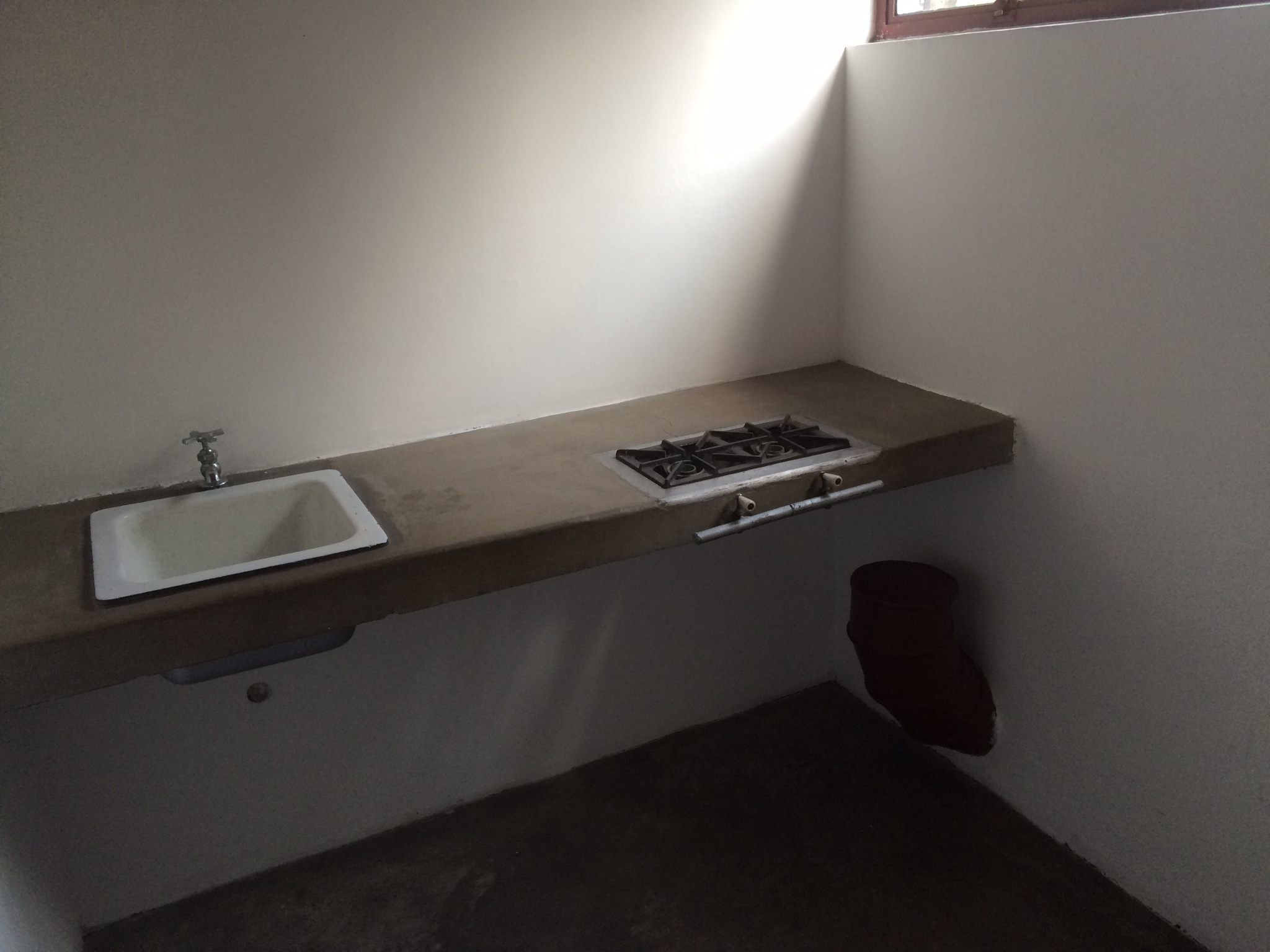 Cocina en la casa de Frida que se encuentra en el Museo Casa Estudio Diego Rivera y Frida Kahlo en San Ángel. Originalmente tenía una estufa de carbón, pero después fue adaptada a gas.